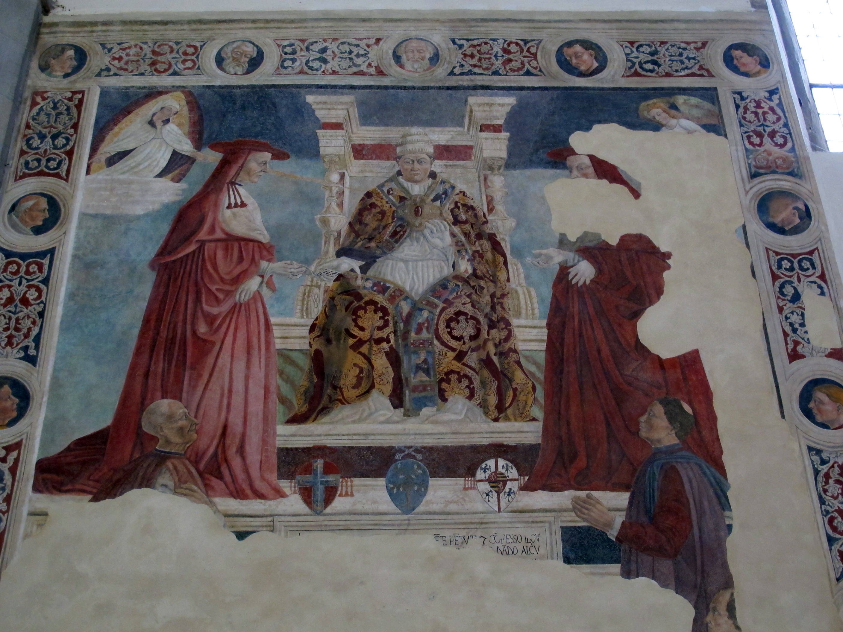 Arezzo, s.m. delle grazie, int. 10 lorentino d'arezzo